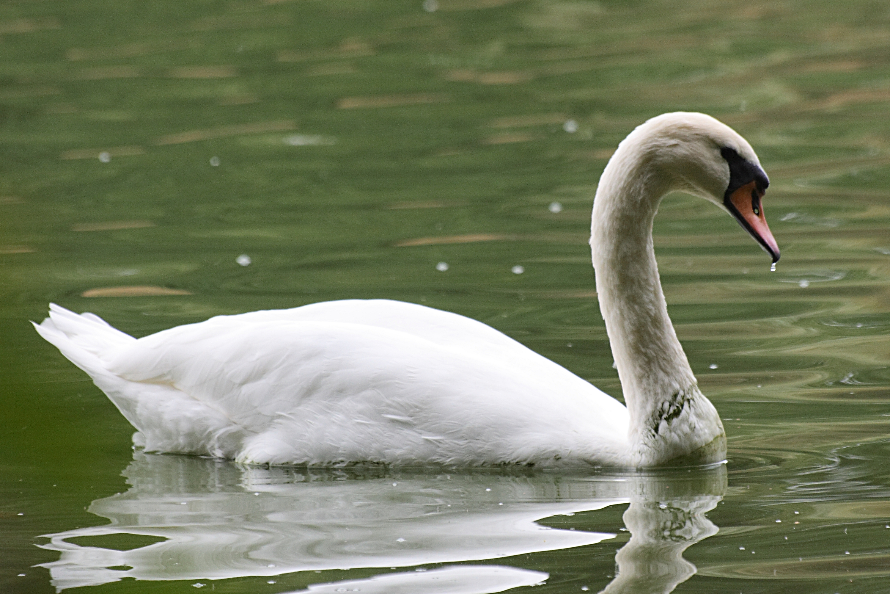 Labuť (Cygnus) na rybníce Kalý